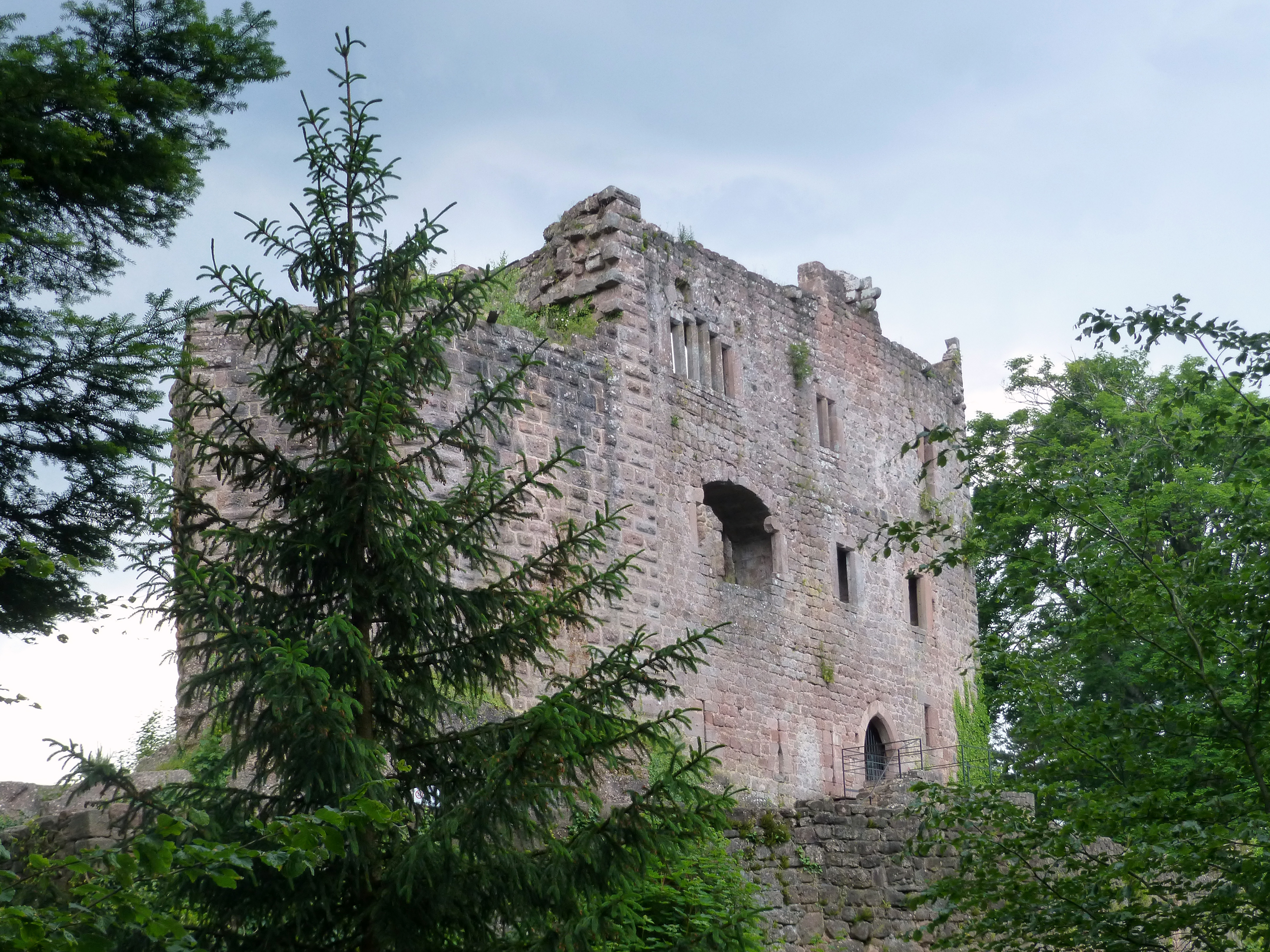 Château du Birkenfels (Bas-Rhin)